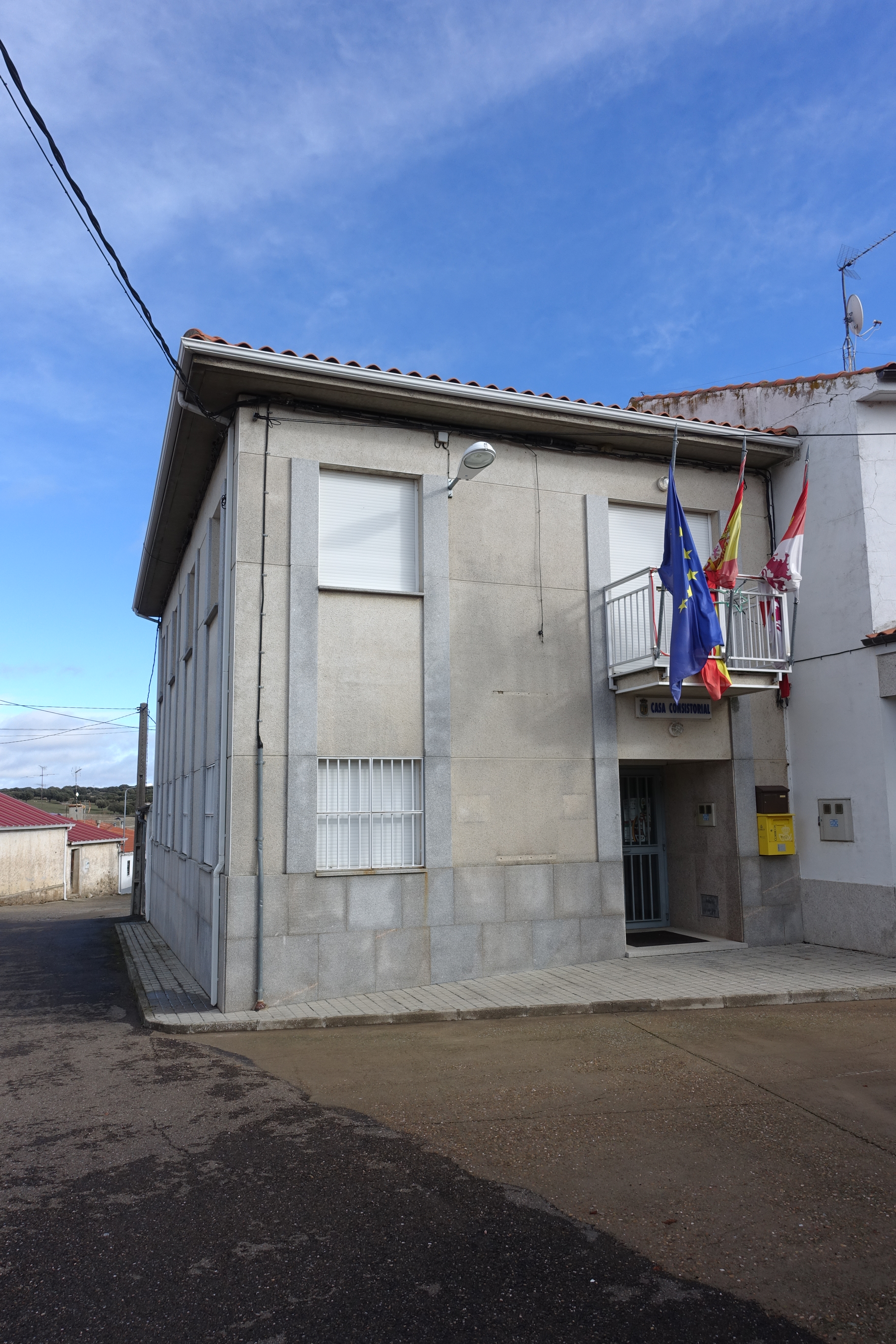 Casa consistorial de Vecinos (Salamanca, España).